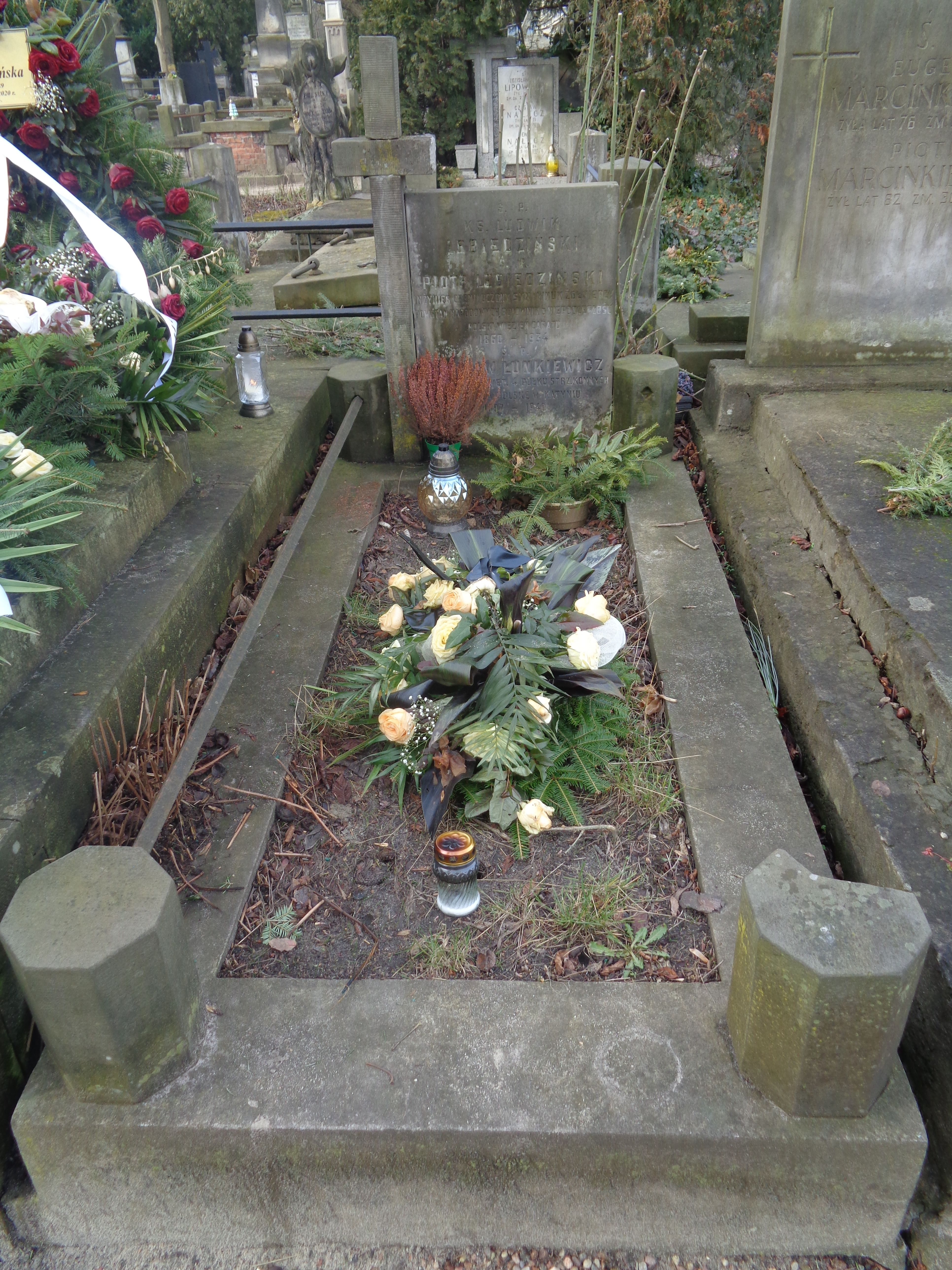 Grób Piotra Lebiedzińskiego na Cmentarzu Powązkowskim